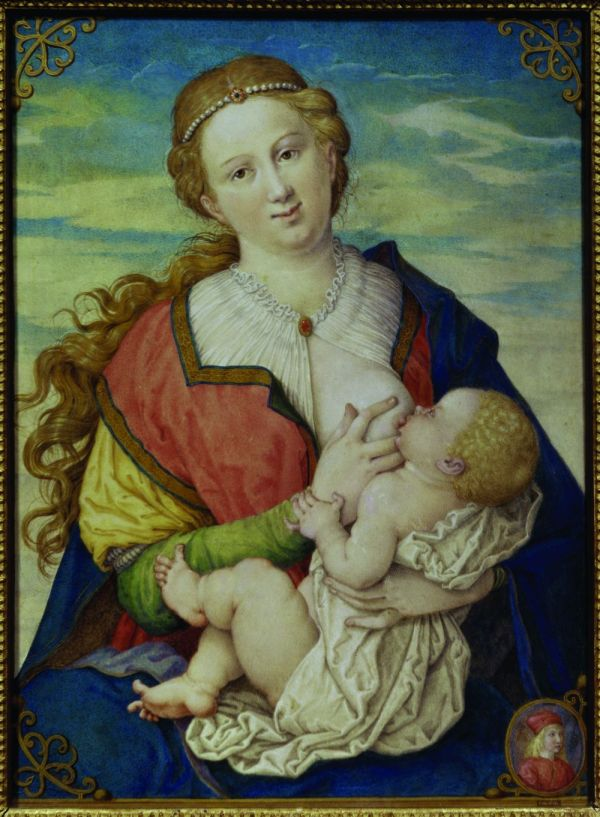 Akvarel vycházející z kresby Albrechta Dürera "Kojící Madona". Dílo se nachází v Uměleckoprůmyslovém muzeu ve Vídni.